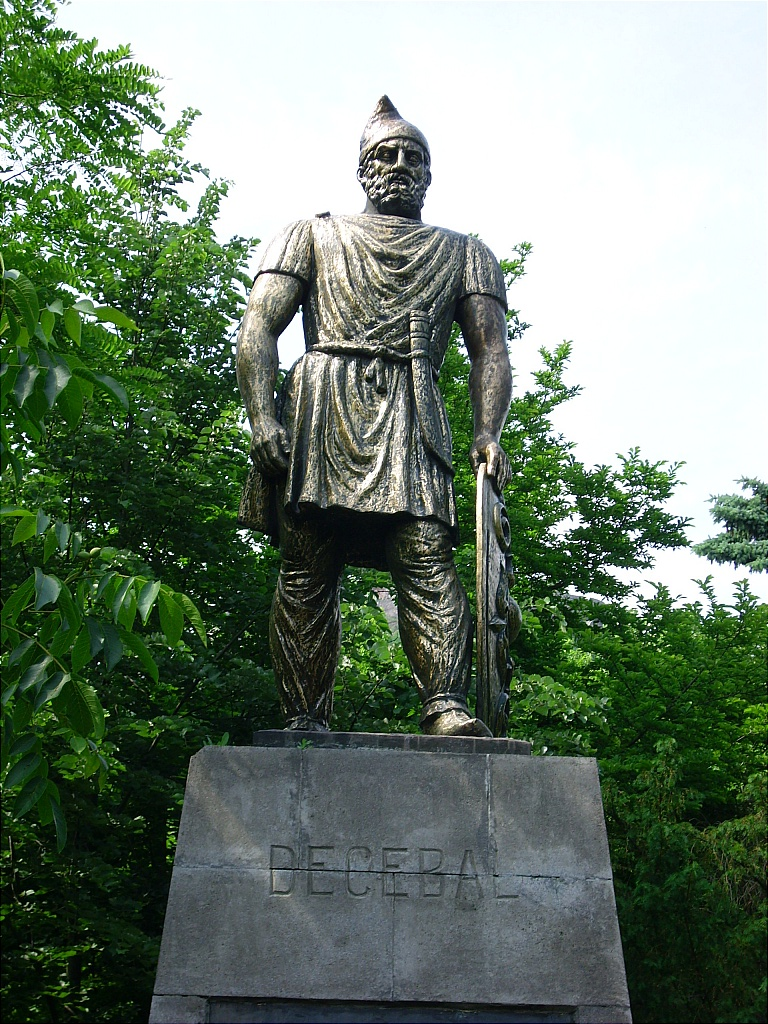 Statuia lui Decebal, ultimul regele al dacilor, situata in Parcul Cetatii din Deva